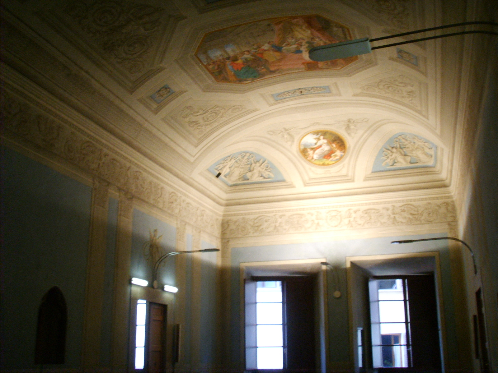 Palazzo gianni vegni, galleria, Alessandro Gherardini, volta